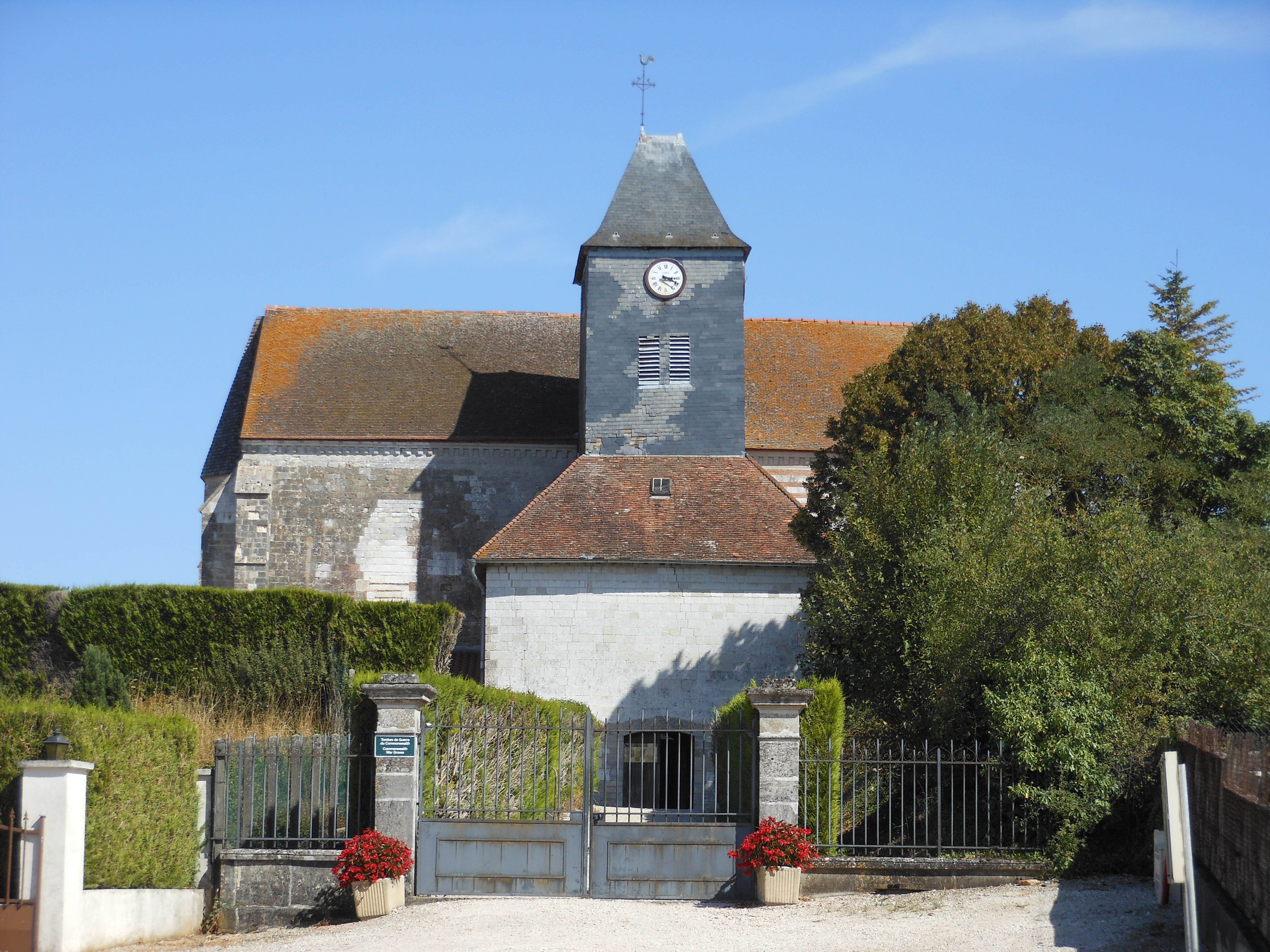 Église Sainte-Marguerite de Margerie-Hancourt, (Classé, 1862) .